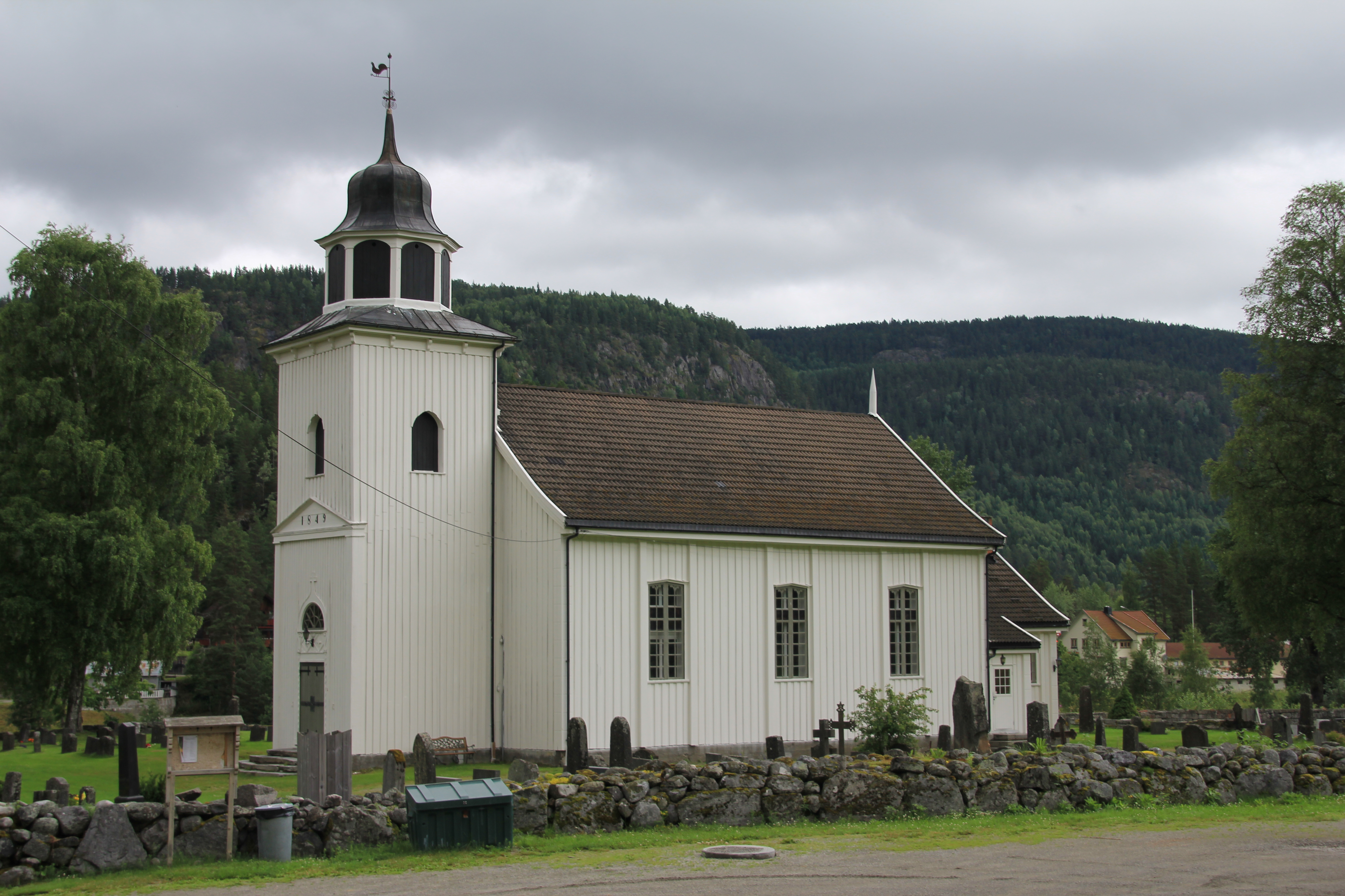 Gransherad kirke (Gransherad kyrkje) er en langkirke fra 1849 i Notodden kommune, Telemark fylke.